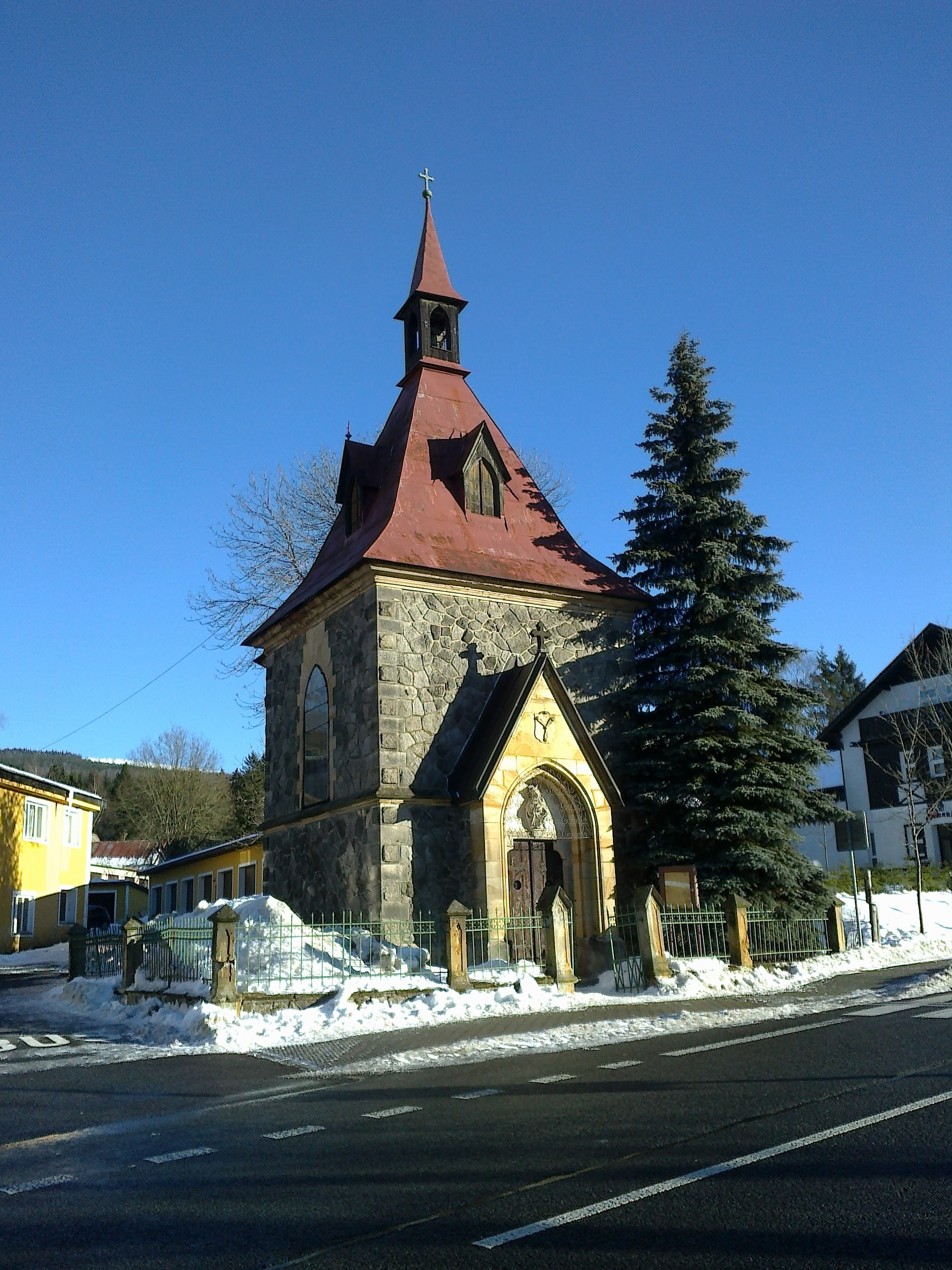 Harrachov - kaple sv. Alžběty3